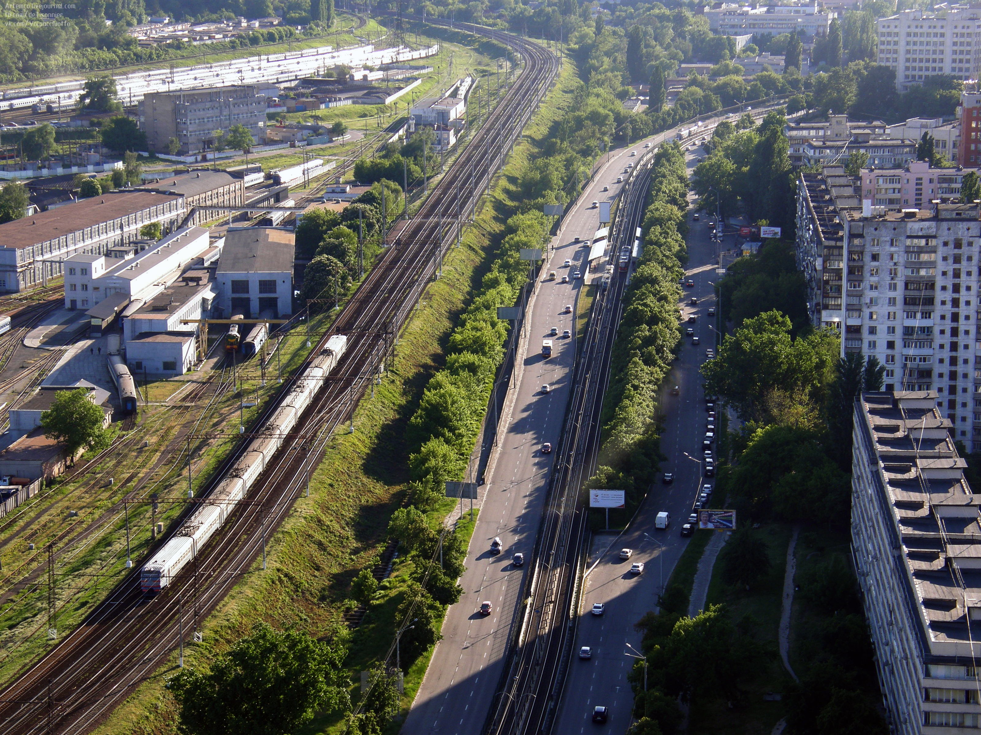 улица Борщаговская вдоль железной дороги